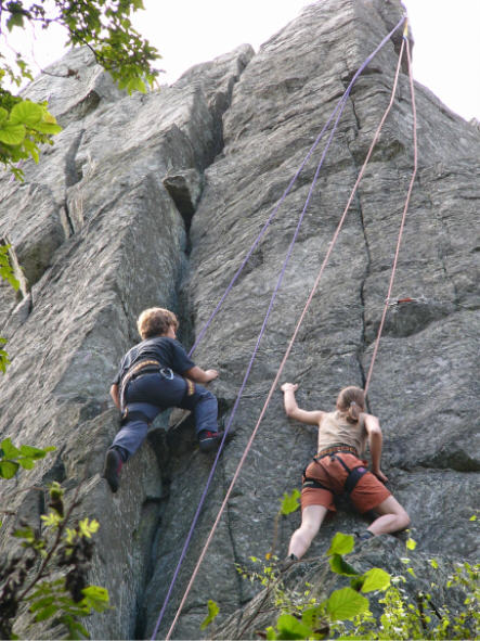 Das Foto zeigt, dass sogar Kindern bzw. Jugendlichen das Klettern an der „Steinwand“ ermöglicht wird; Rhön.